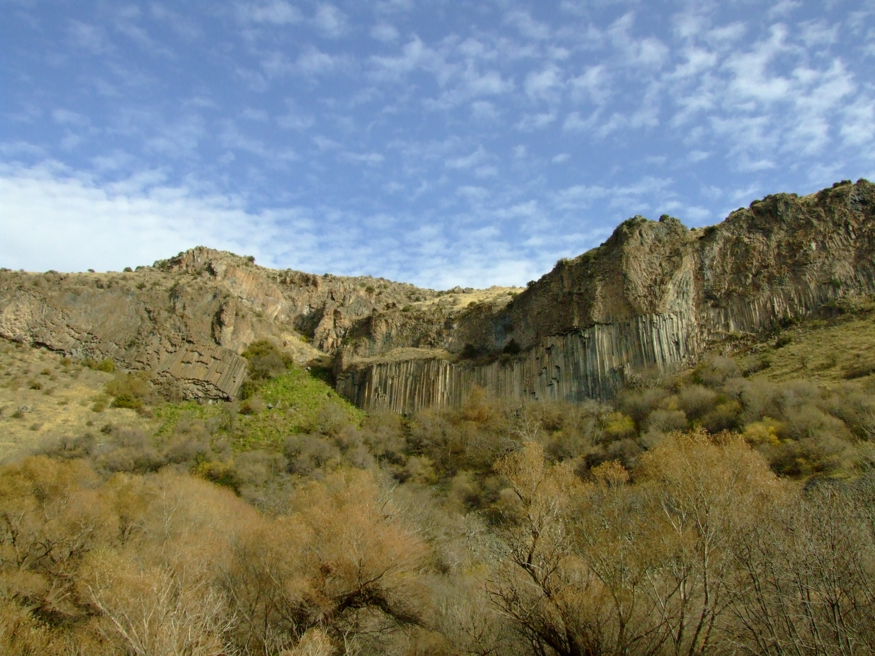 «Բերդի գլուխ» ամրոցի հրվանդան 1